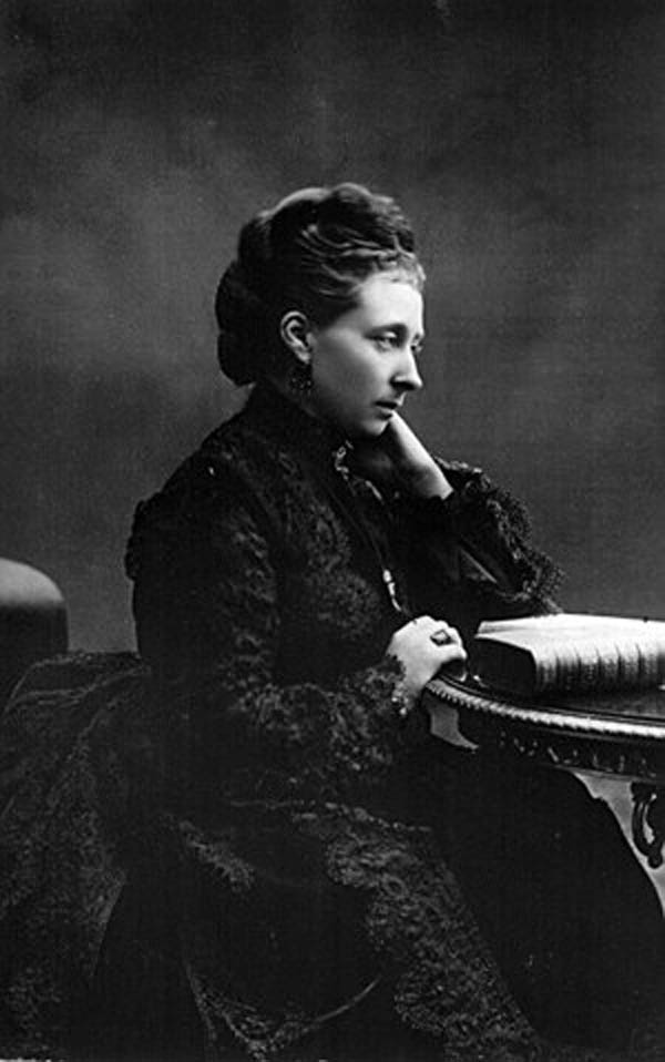 Photographie de Alice de Grande-Bretagne, Grande-Duchesse de Hesse